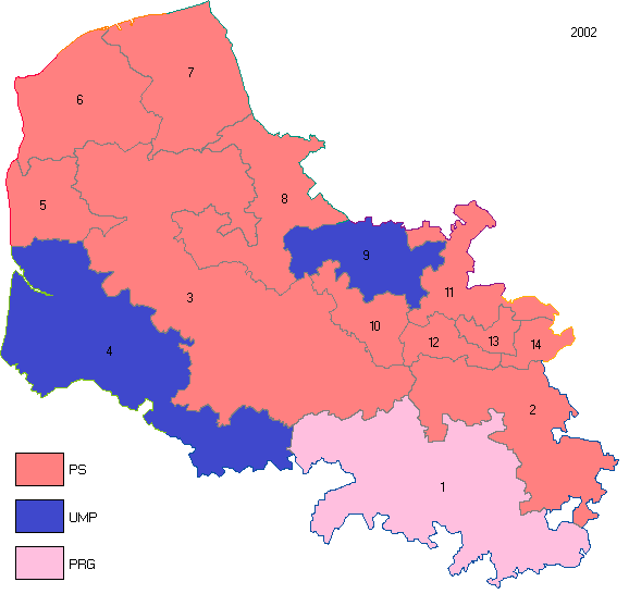 Pas-de-Calais en 2002.